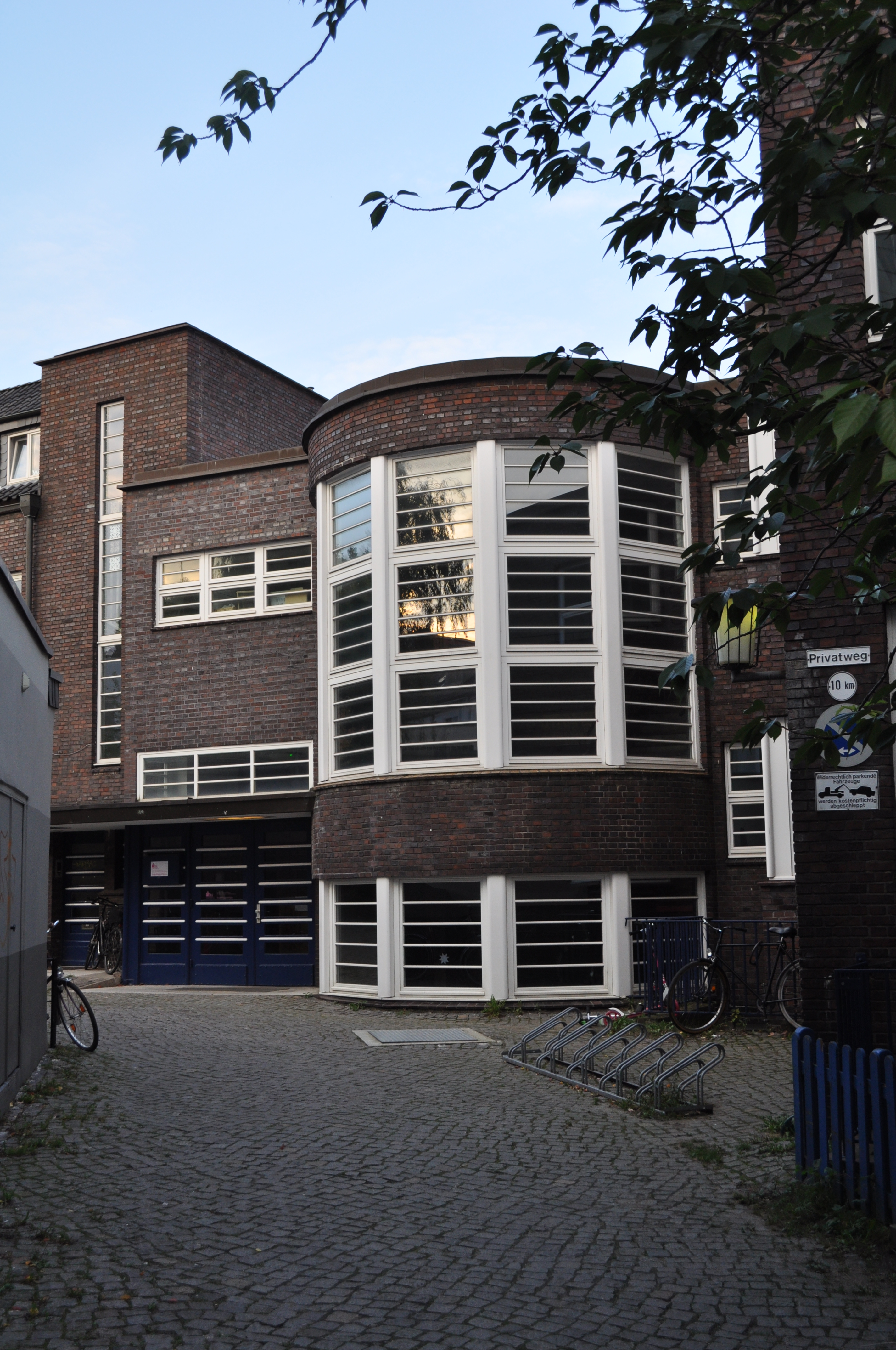 Gemeindehaus der Osterkirche in Hamburg-Ottensen. This is a photograph of an architectural monument.